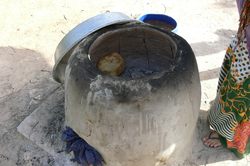 Deze ovens worden in grote delen van Afrika gebruikt voor het bakken van brood, het deeg wordt tegen de binnenwanden geplakt tot het brood gereed is.